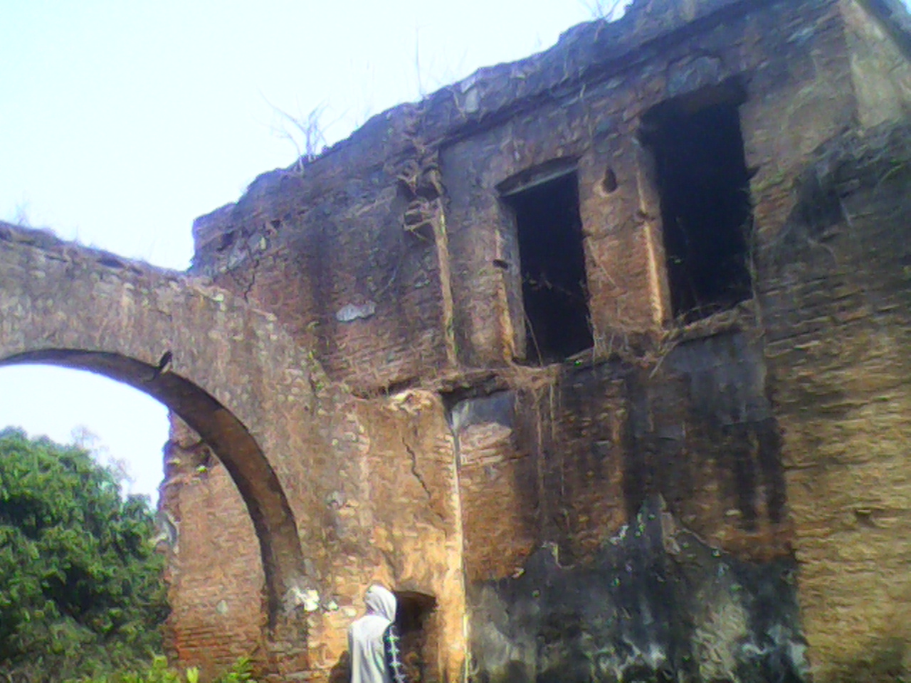 ভাটপাড়া নীলকুঠি